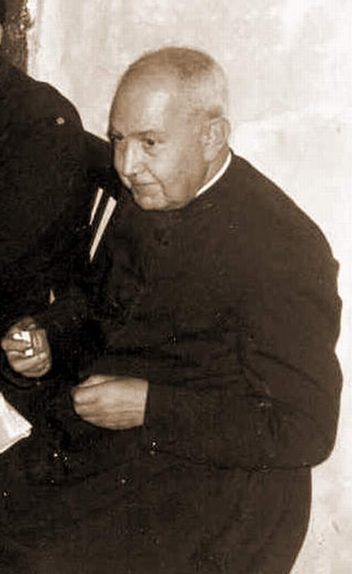 César Tomás Laguía (1903-1979) con unos amigos [Modificada de "La villa de El Cuervo y su parroquial" (2000), p. 71].